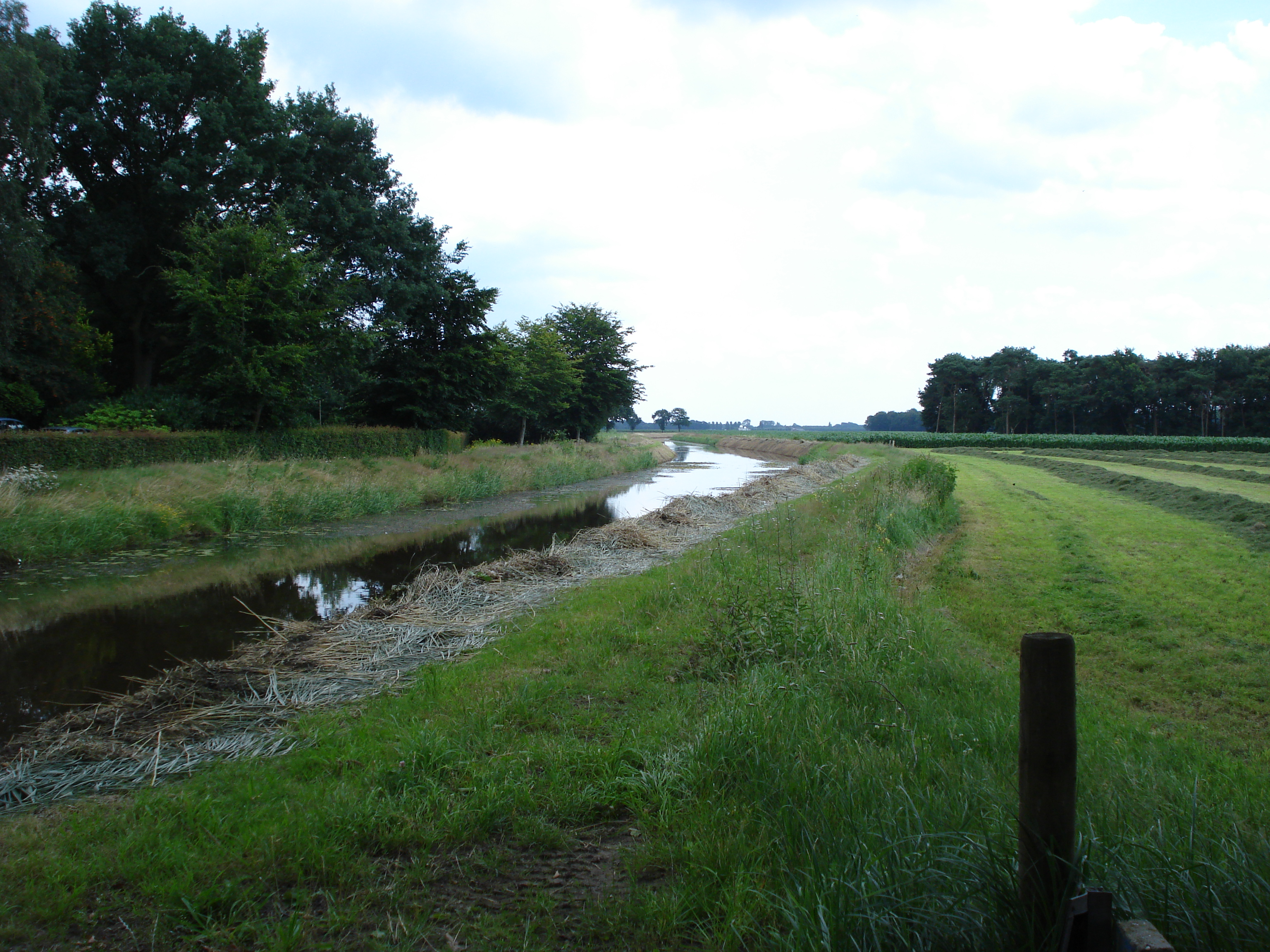 Vinkel, de Groote wetering